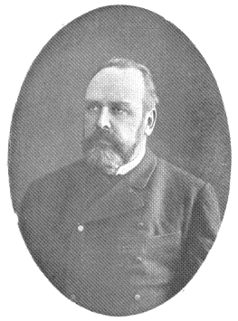 Jan Jarkowski - polski inżynier